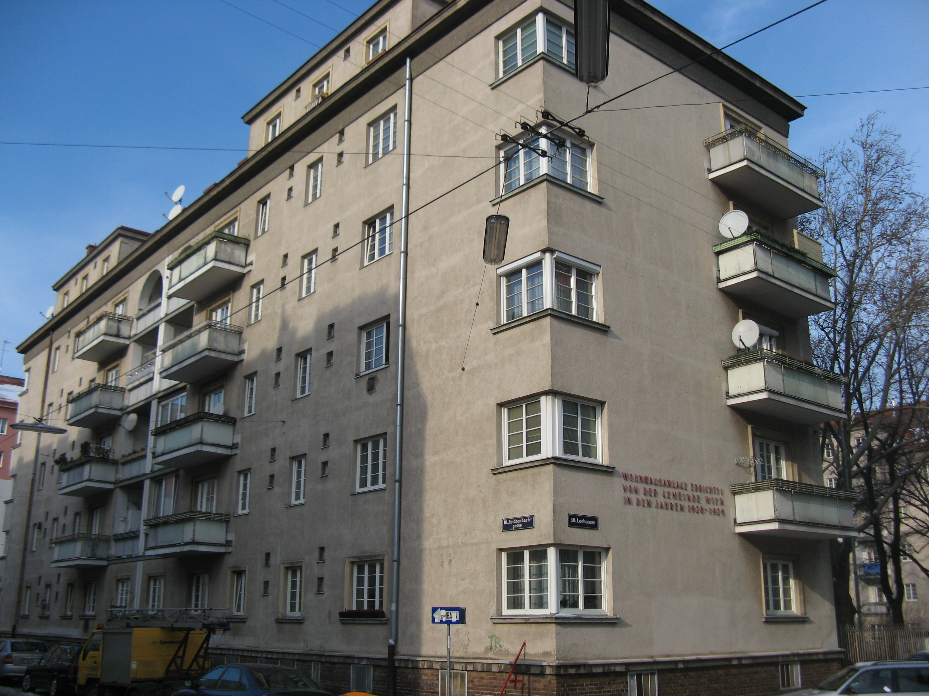 Margarethe-Hilfinger-Hof (1928-29) von Franz Zabza, Leebgasse 100, Wien-Favoriten